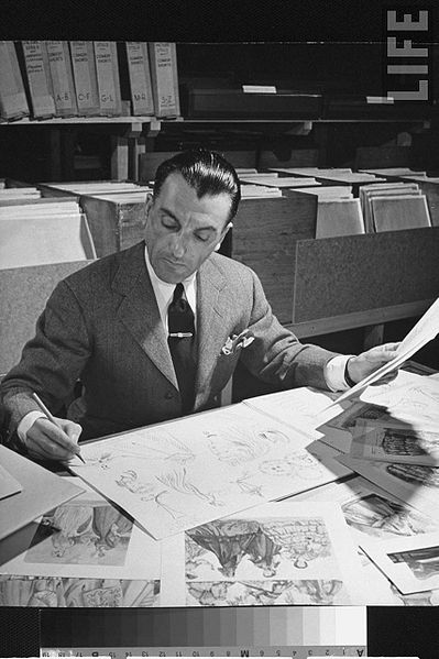 Константин Аладжалов за созданием обложки журнала